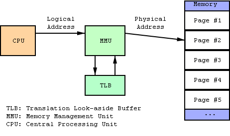 Prinzipdarstellung der Arbeitsweise einer MMU